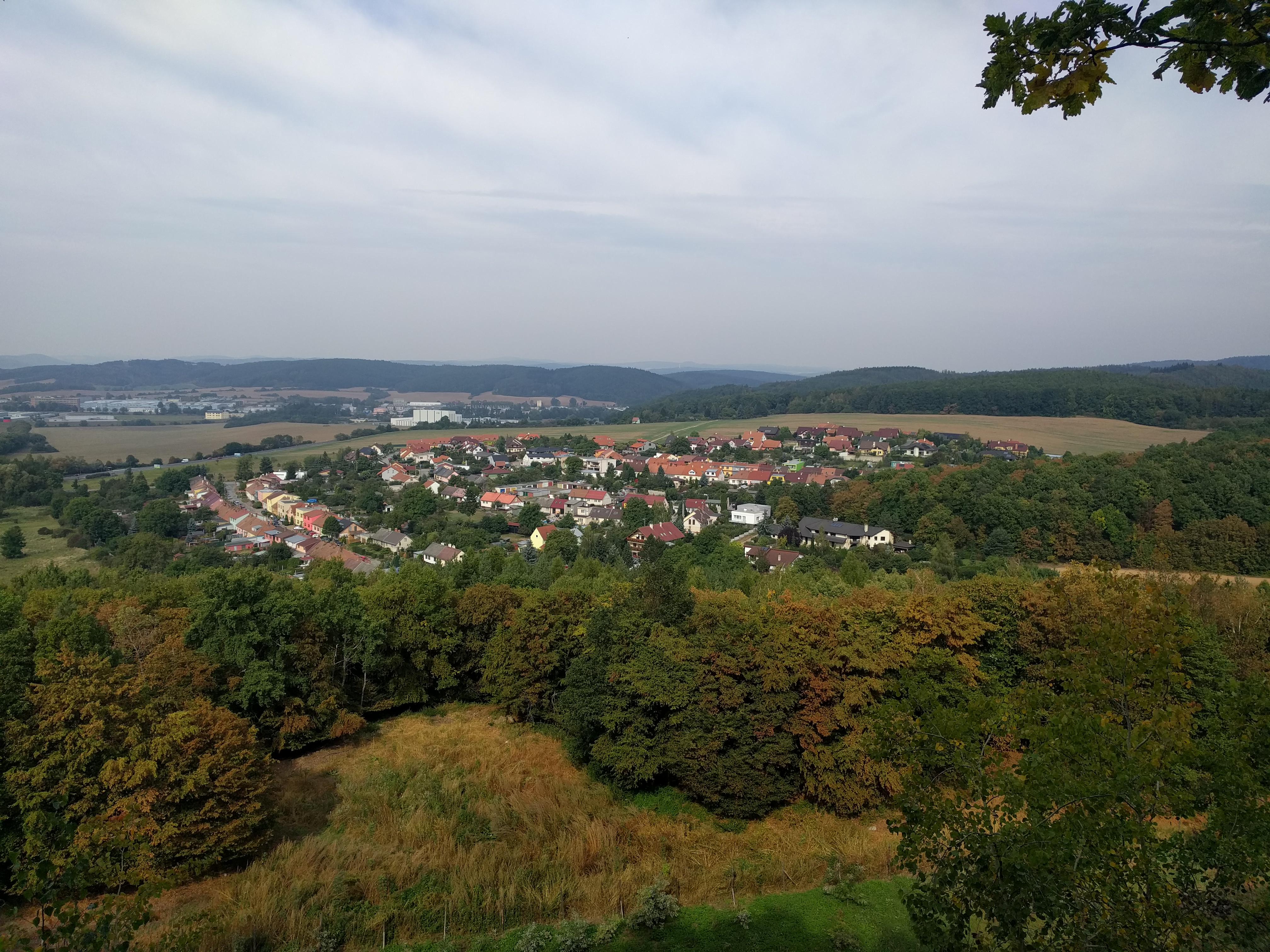 Kuřim - Podlesí